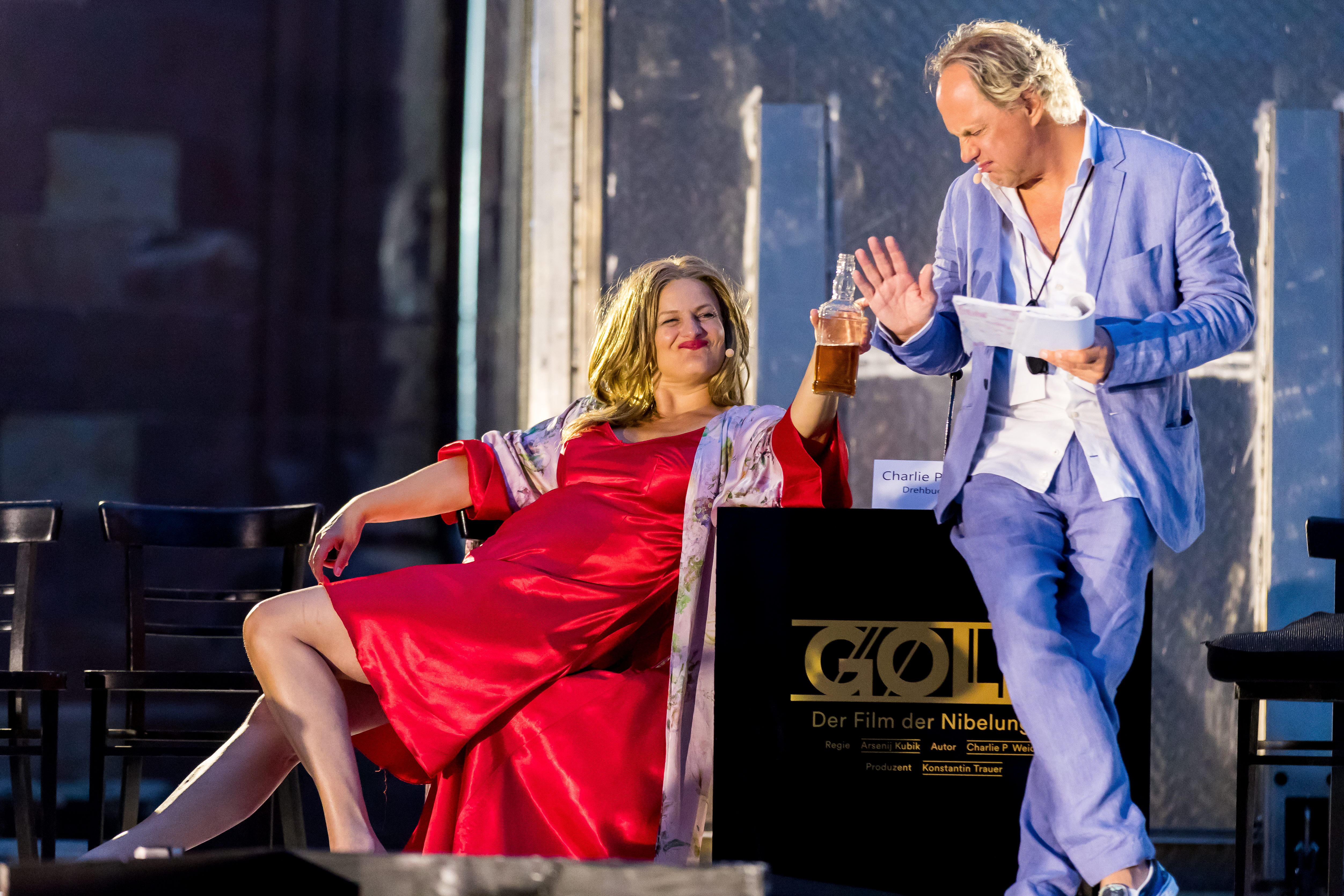 2016: Uraufführung: "GOLD. Der Film der Nibelungen" Regie: Nuran David Calis Autor: Albert Ostermaier Intendant: Nico Hofmann --- Ensemble: Produzent Konstantin Trauer: Uwe Ochsenknecht Regisseur Arsenij Kubik: Vladimir Burlakov Drehbuchautor Charlie P. Weide: Josef Ostendorf Society Reporter Peter Scheumer: Dominic Raacke Kamerafrau "the eye": Anna Rot Setdesignerin "set": Joy Maria Bai Assistentin des Produzenten Carmen: Alexandra Kamp Maskenbildnerin Sueyla Blume : Ayse Bosse die Ältere Kriemhild Karina Bergmann: Katja Weitzenböck die Jüngere Kriemhild Simone Gehel: Constanze Wächter die Ältere Brünhild Lotte Jünger: Michaela Steiger die Jüngere Brünhild Nathalie Aurun: Dennenesch Zoudé Siegfried Mohamad Söder: Ismail Deniz Hagen René Inner: Sascha Göpel Gunther Klaus Castel: Maximilian Laprell Bürgermeister Franz Koppoler: Heiner Lauterbach during Nibelungenfestspiele "GOLD. Der Film der Nibelungen" at Wormser Kaiserdom, Worms, Rheinland Pfalz, Germany on 2016-07-12, Photo: Sven Mandel